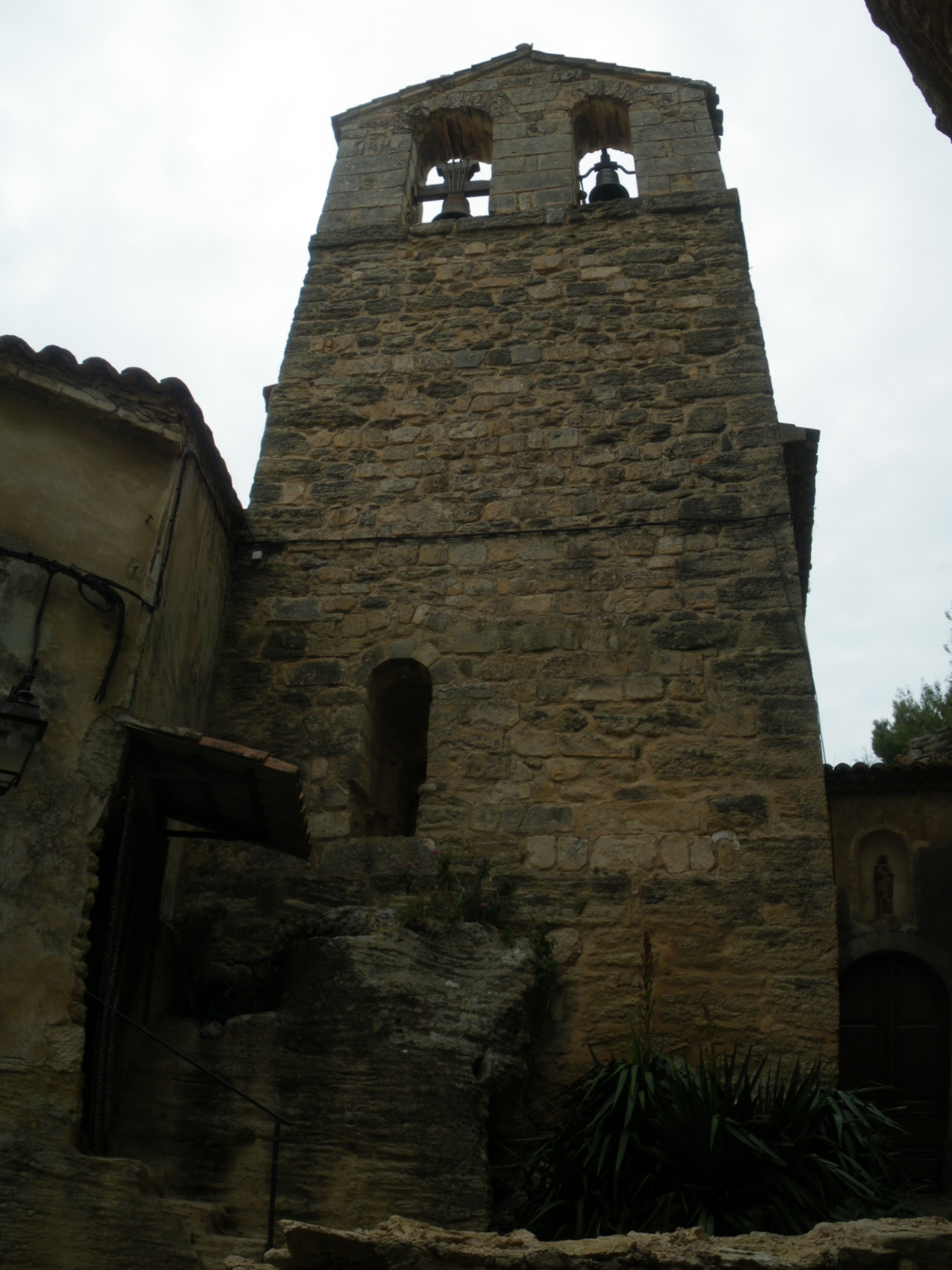 Clocher de l'église Saint Pierre et Saint Paul, à la Roque sur Pernes, Vaucluse, France